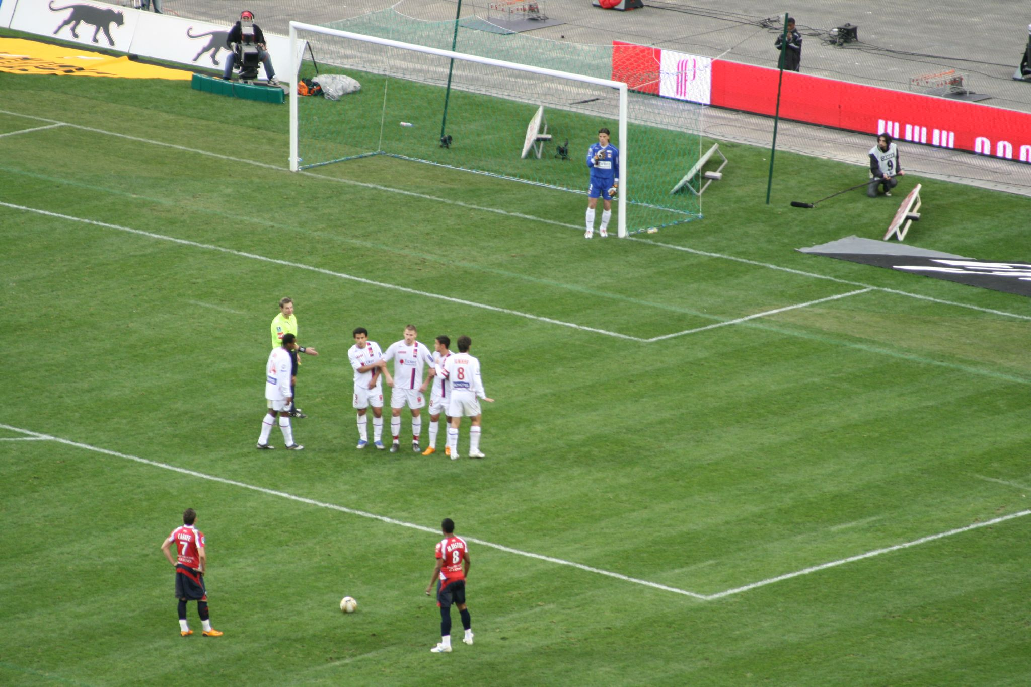 LOSC Lille Métropole - Olympique Lyonnais le 1er mars 2008 au Stade de France pour la 27ème journée de la Ligue 1 saison 2007/2008. Yohan Cabaye et Michel Bastos devant les joueurs lyonnais. Sidney Govou va rejoindre de gauche à droite Fred, Bodmer, Ben Arfa et Juninho. Le gardien collé à son poteau, Greg Coupet, place son mur. L'arbitre du match, habillé en jaune et qui invite Govou à rejoindre ses coéquipiers, est Alain Hamer.